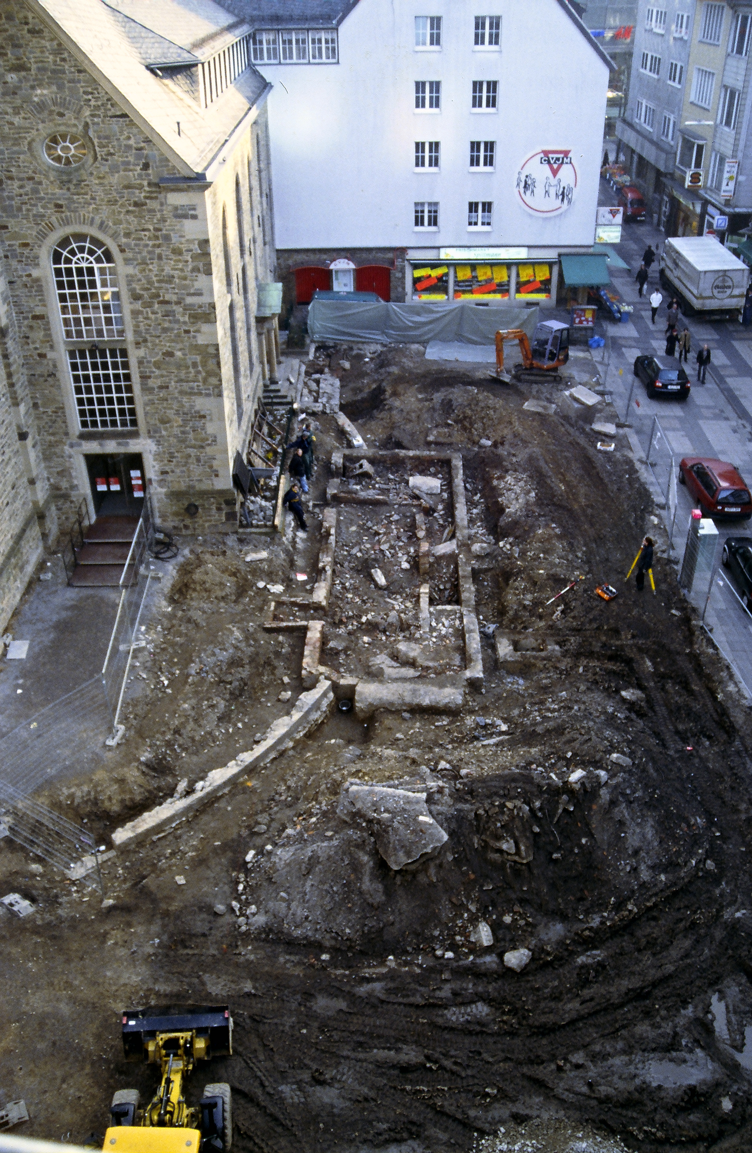 Vorplatz der Citykirche/Elberfeld bei den Ausgrabungen von 2003.